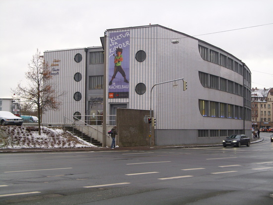 Das Theater Mummpitz im sogenannten Kachelbau in der Michael-Ende-Straße 17 in Nürnberg